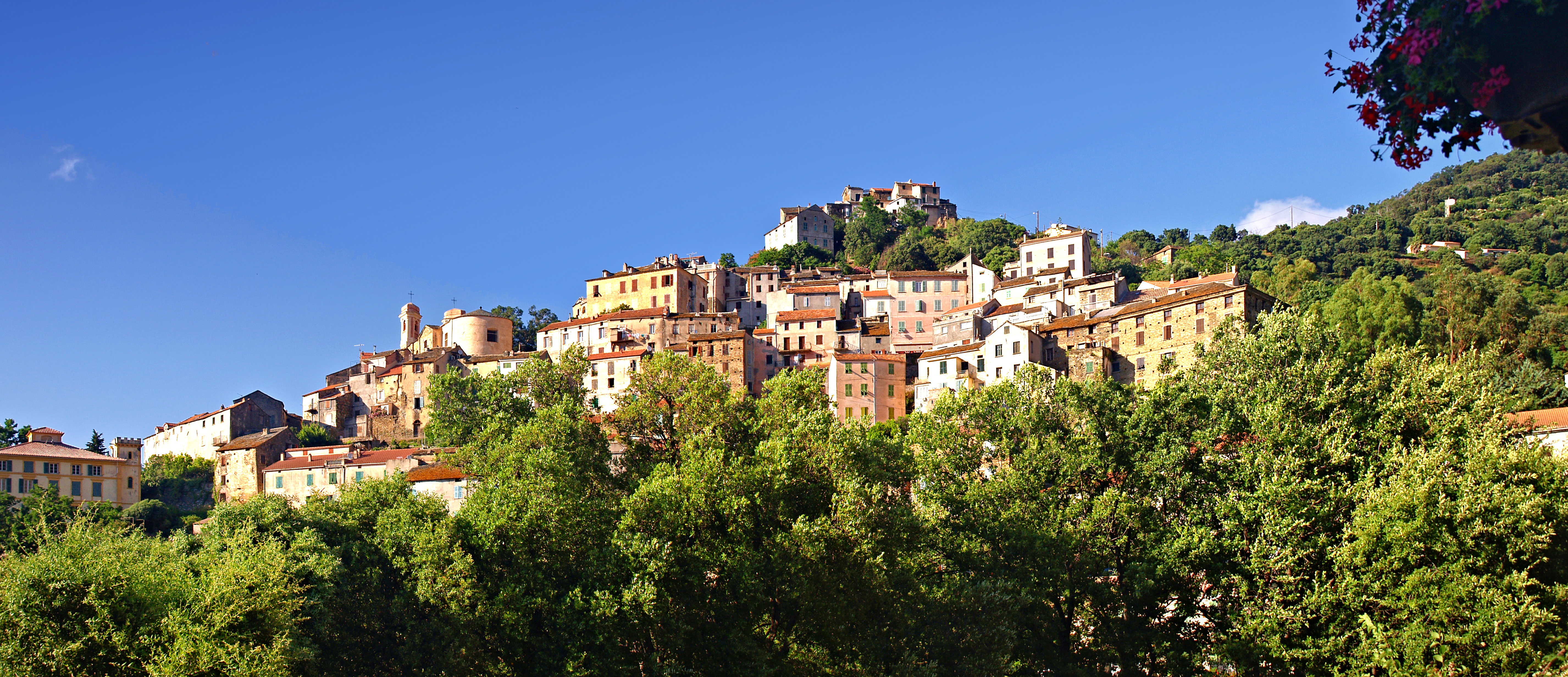 Oletta (Corsica) - Panorama